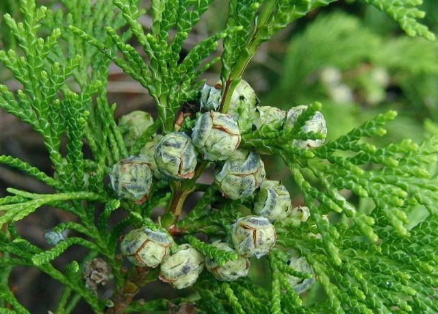 Chamaecyparis lawsoniana